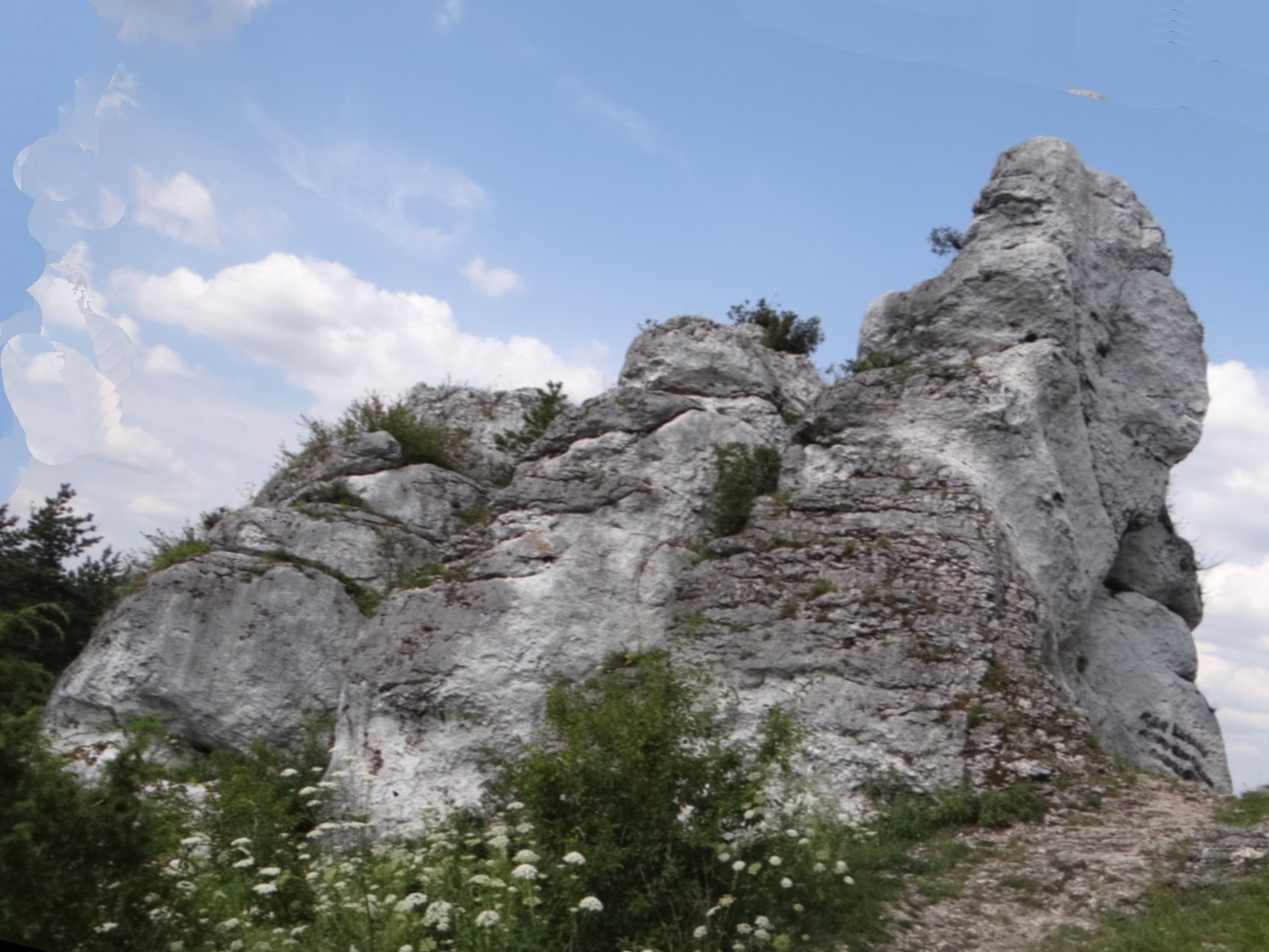 Góry Towarne Małe